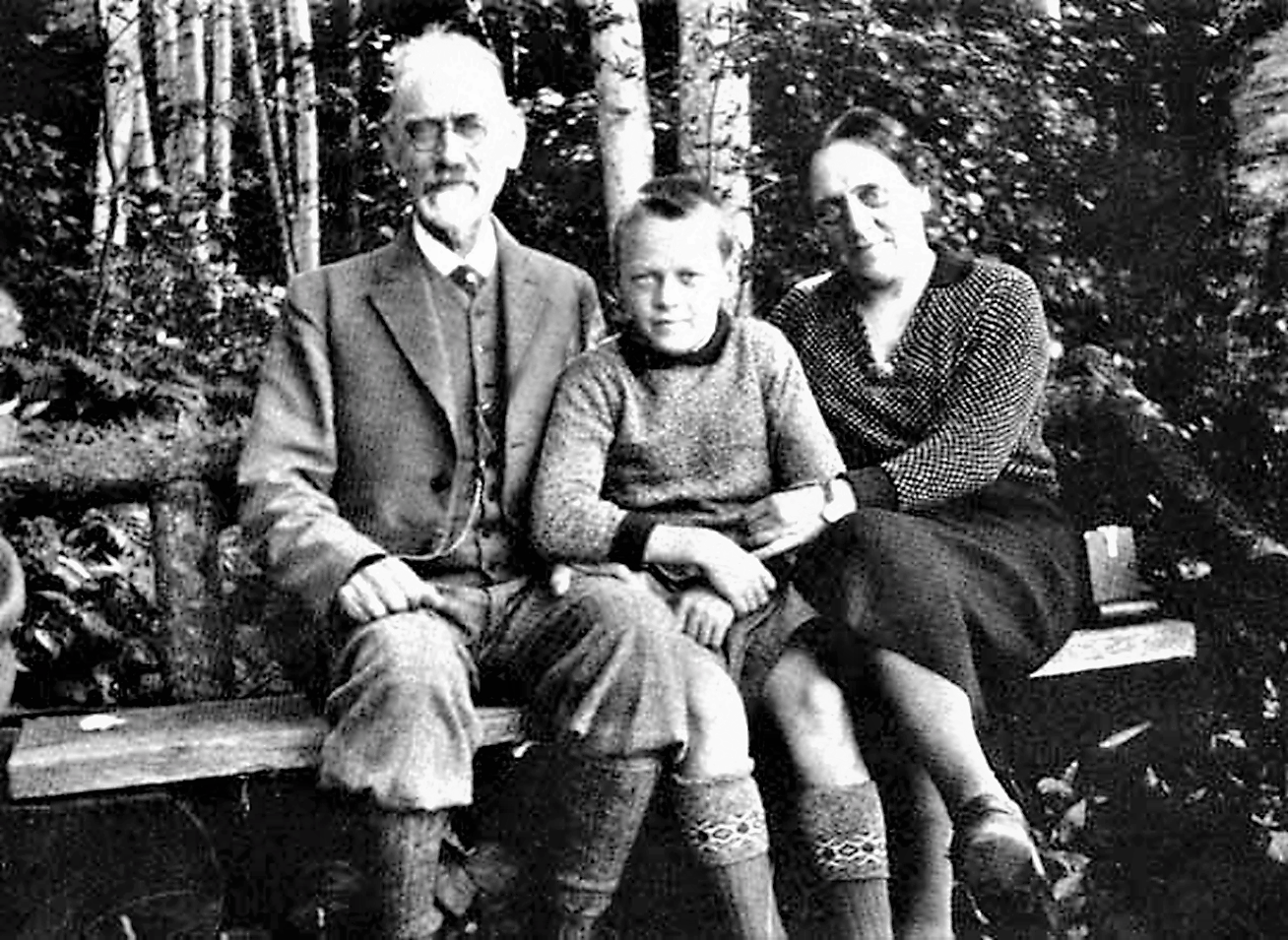 Jakob Emanuel Lange (1864-1941), Botaniker, Mykologe, Politiker mit Gattin Bodil und Sohn Morten um 1930